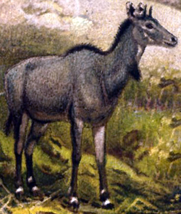 Nilgau